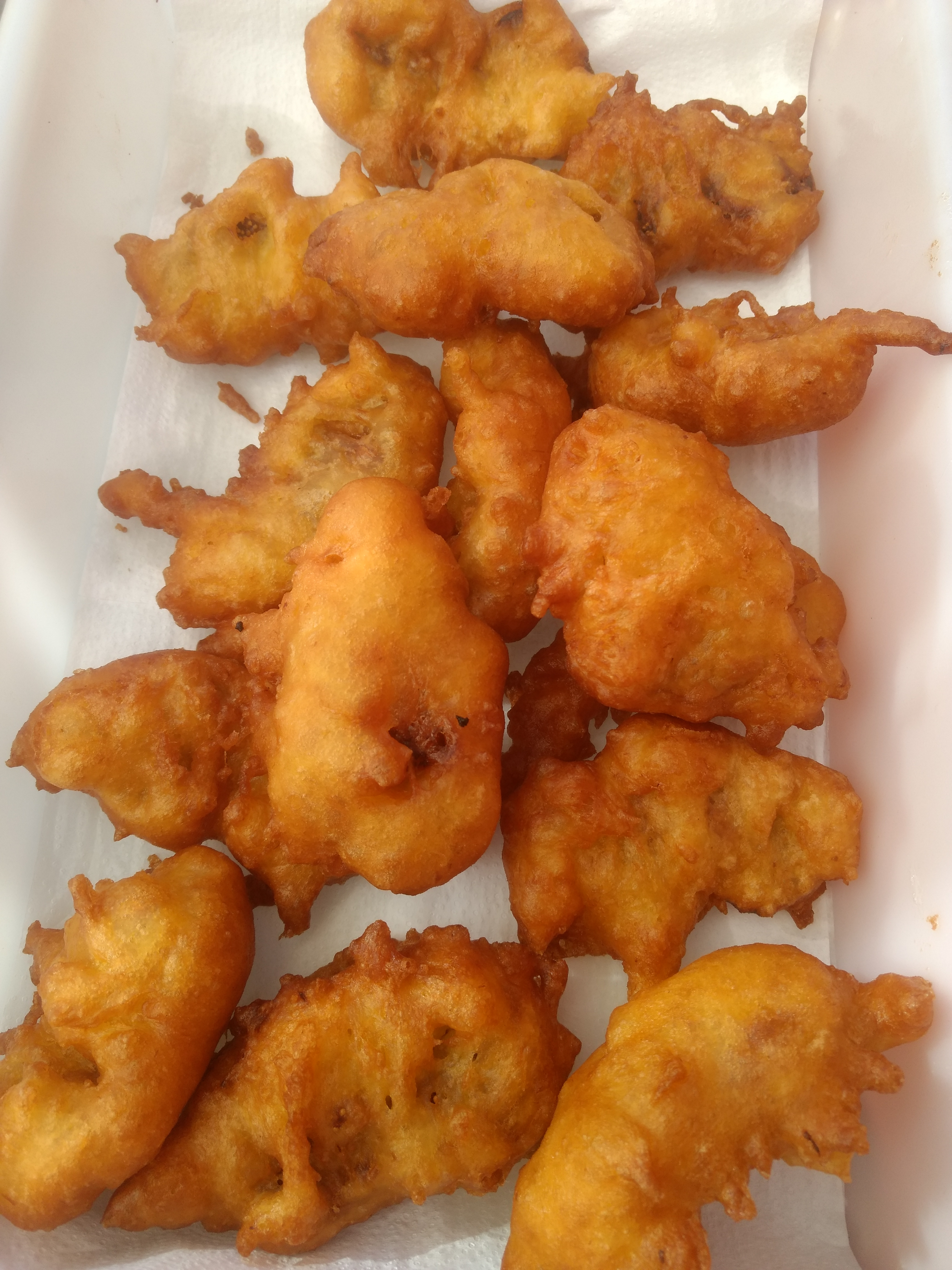 Figues albardades comprades a Bàrbara (Casinos-L'Eliana-València).